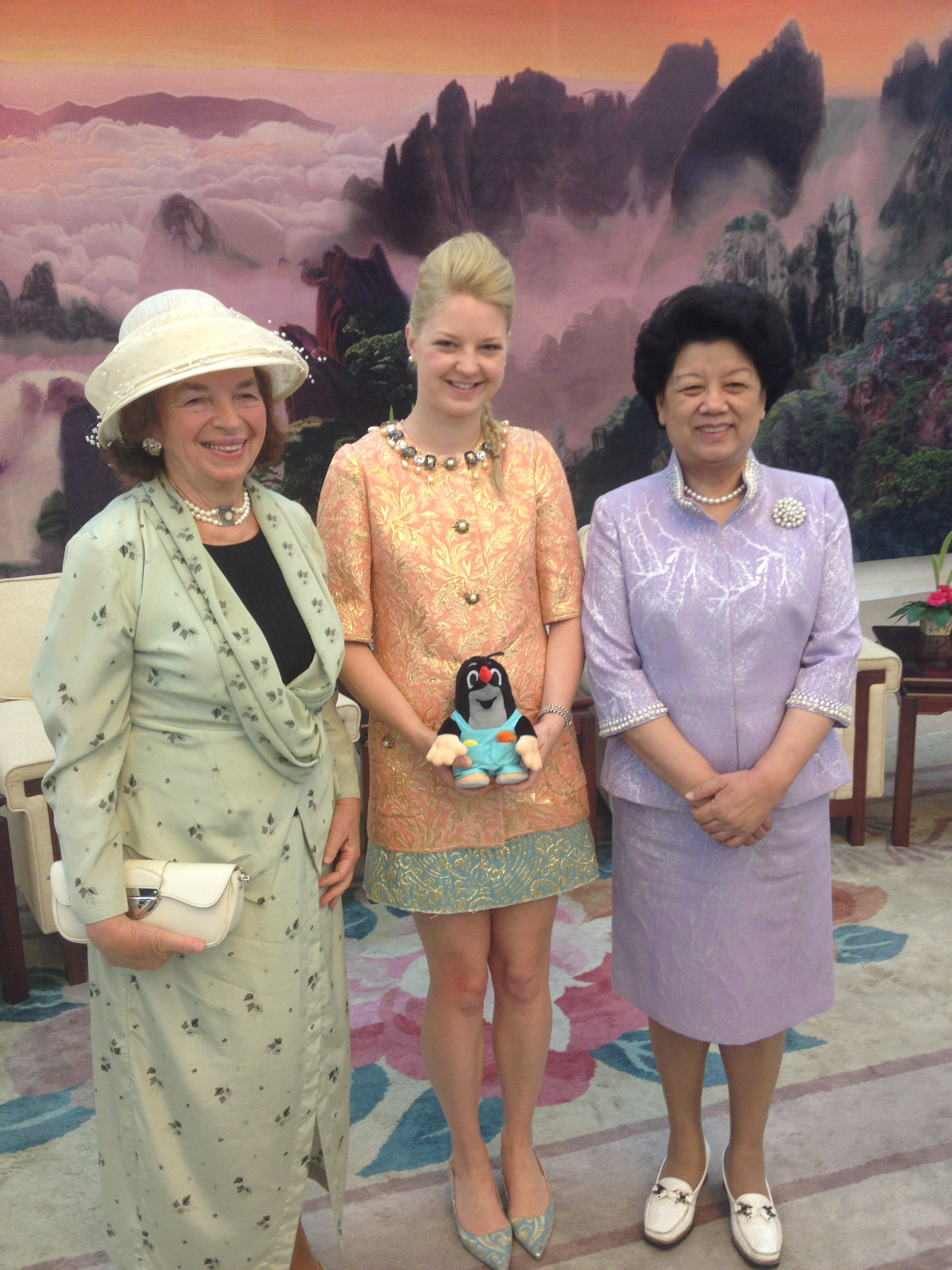 Karolína Milerová s bývalou první dámou Livií Klausovou při návštěvě Číny v roce 2012